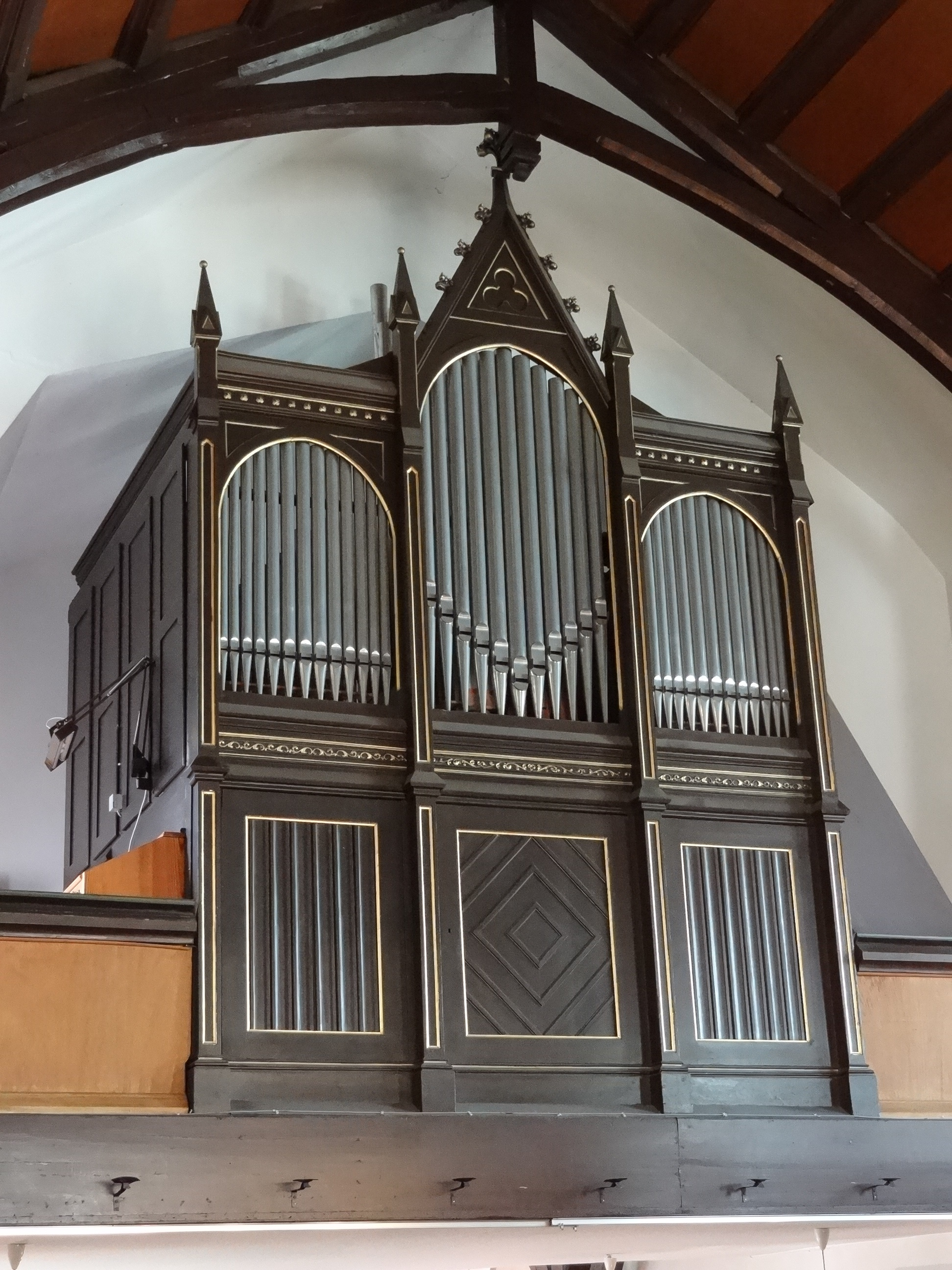 Evangelische Kirche (Lützellinden)